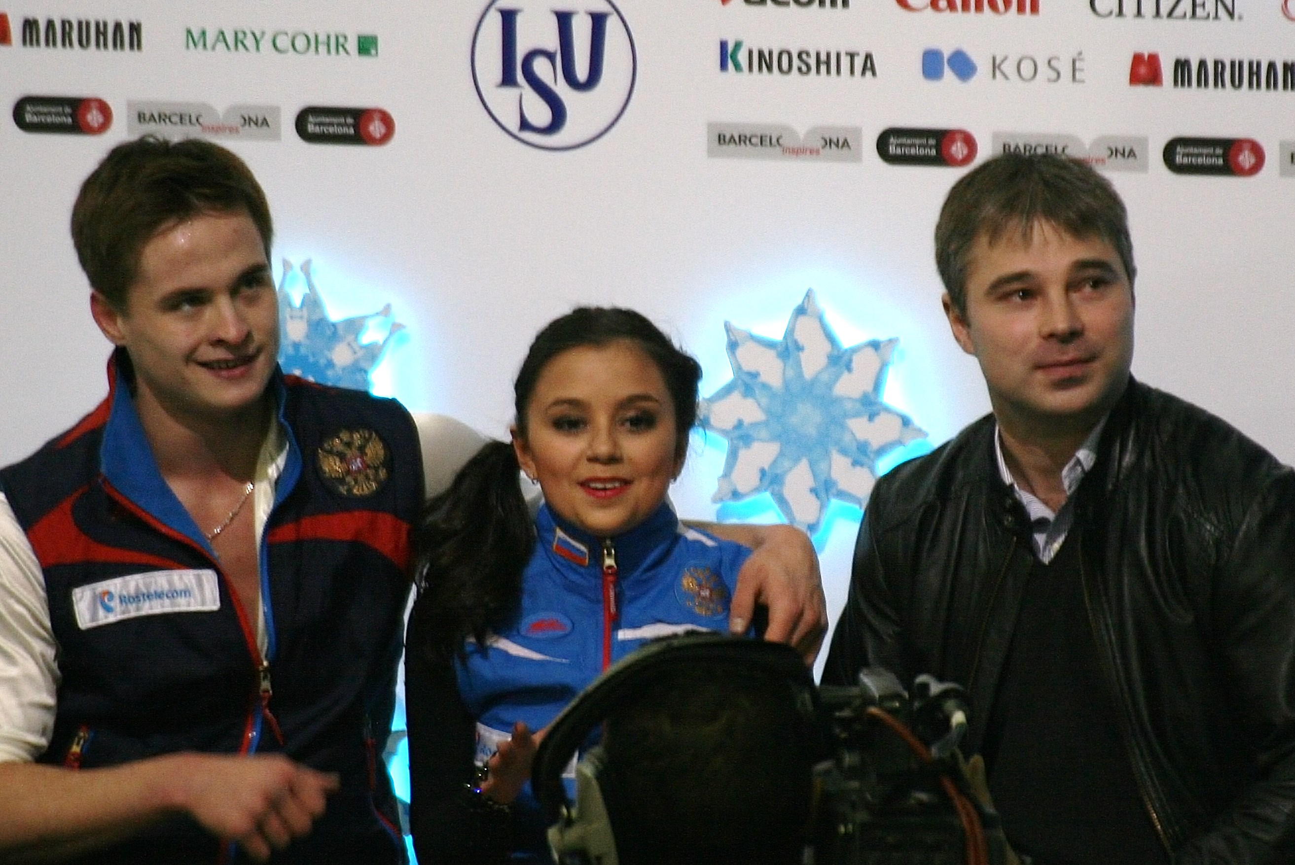 Лина Фёдорова и Максим Мирошкин (Россия) со своим тренером Владиславом Жовнирским на финале Гран-при среди юниоров 2014-2015.